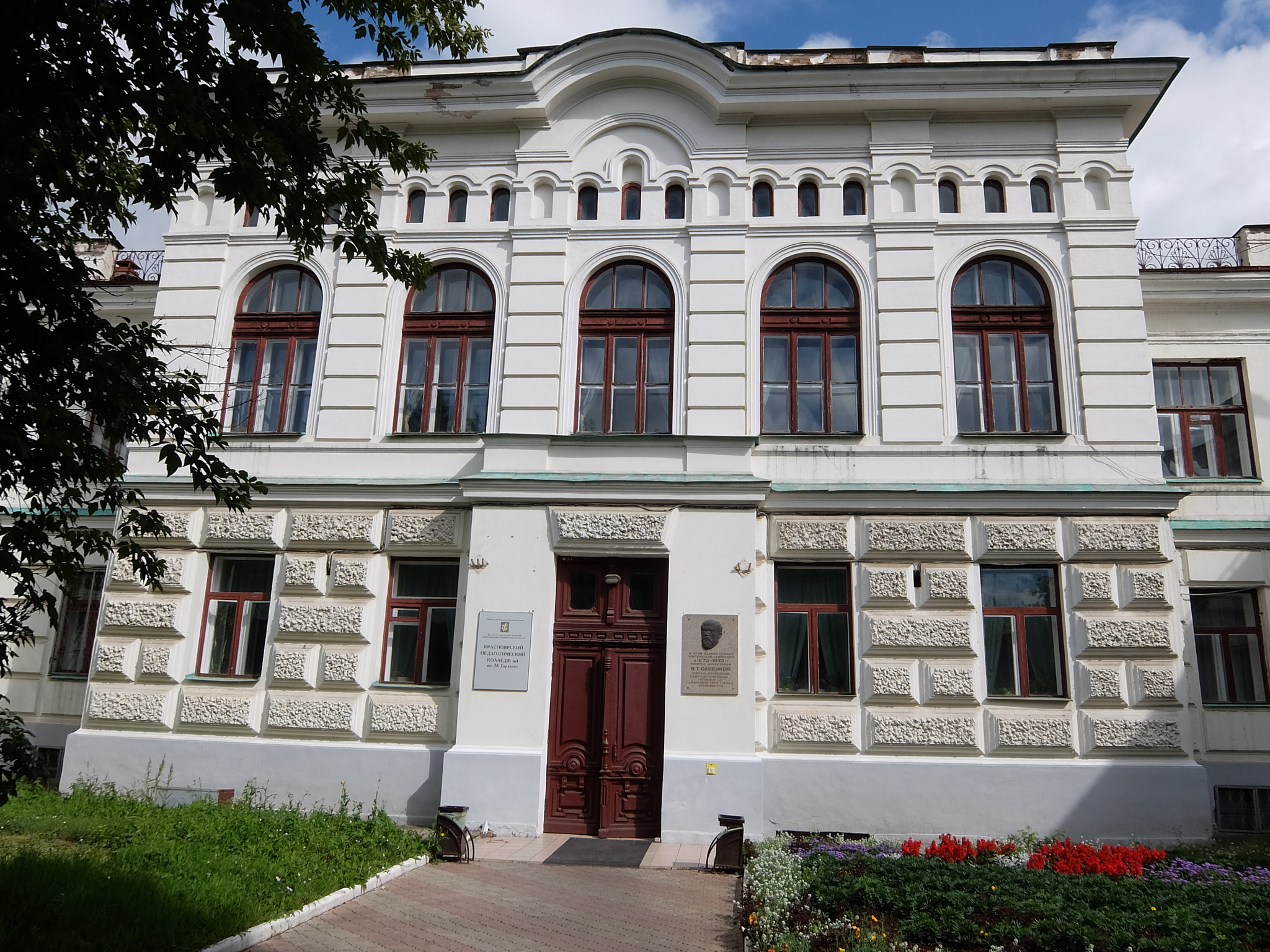 Историческое здание учительской семинарии в Красноярске, около 1900г. арх.:Фольбаум А.А.